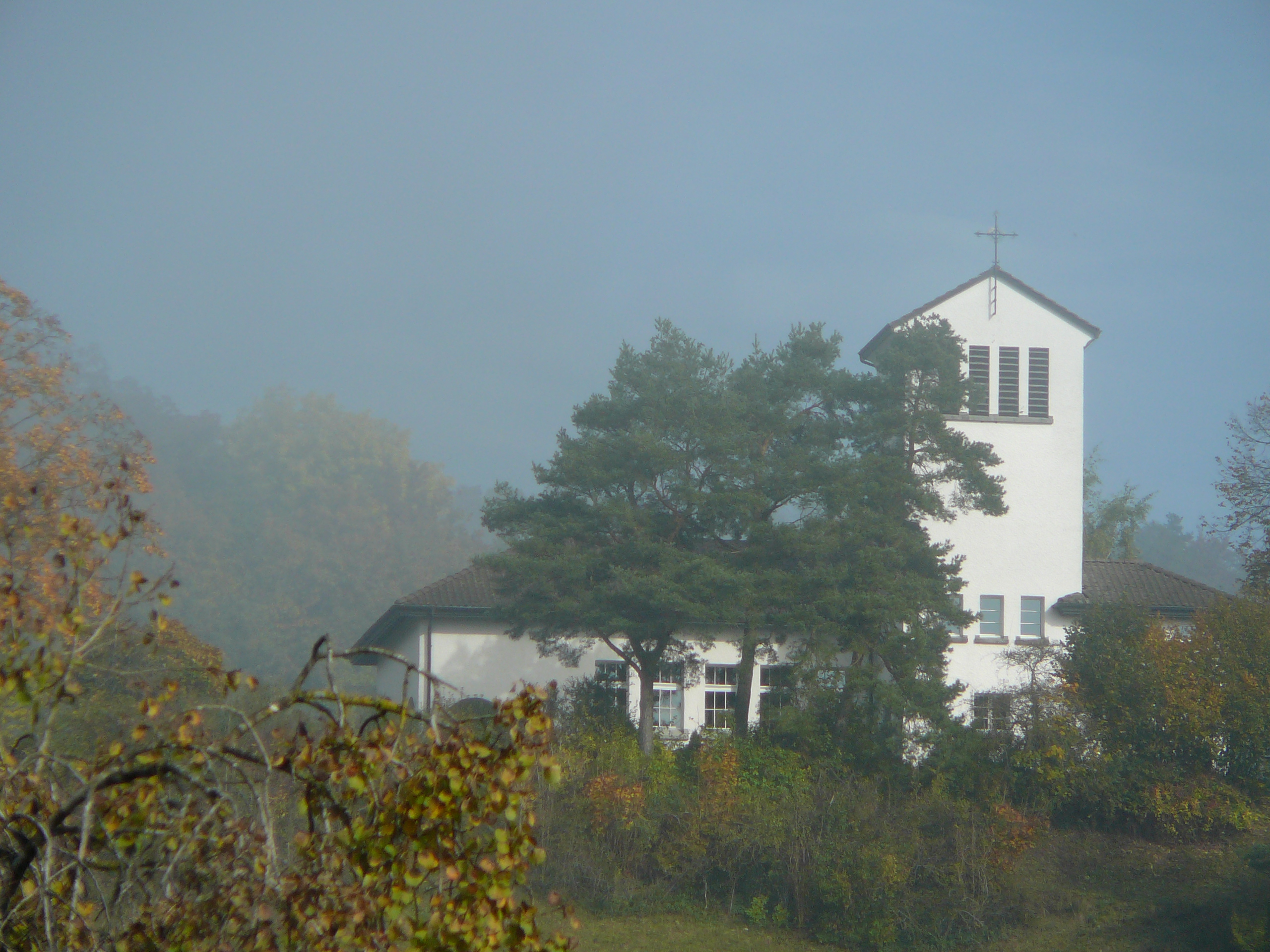 Römisch-katholische Pfarrkirche St. Josef Glattfelden, Ansicht von Süden